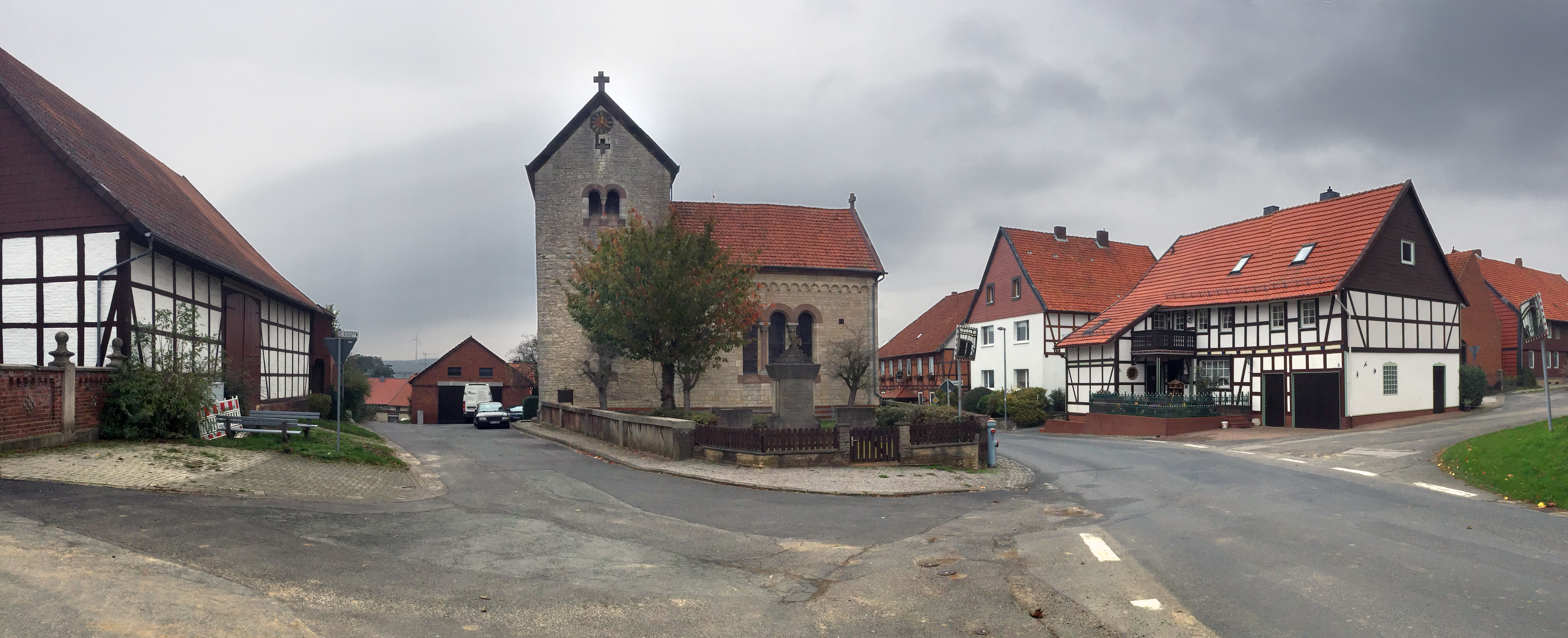 Dankelsheim – Zentrum mit Johanniskirche – Foto 2019